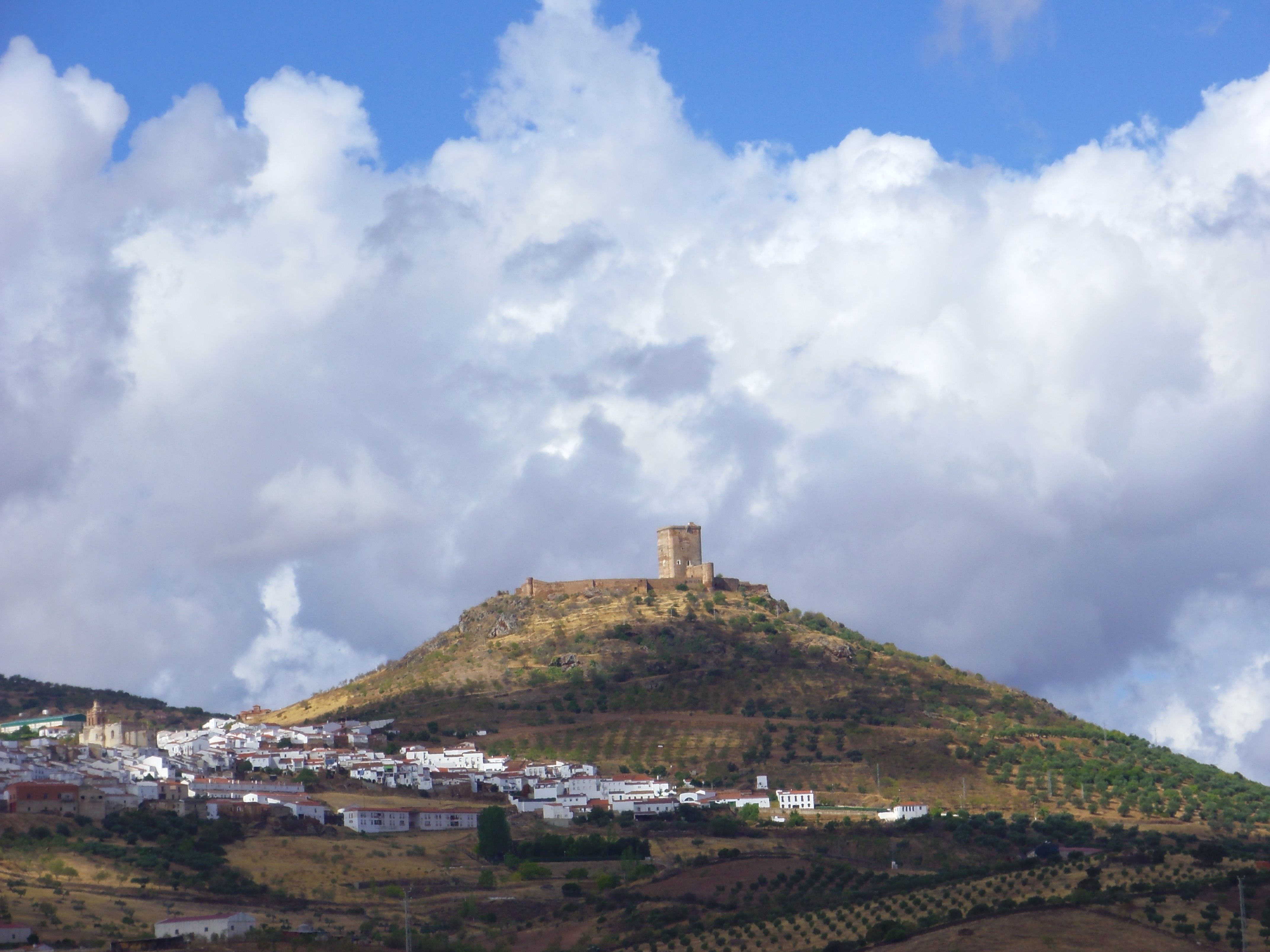 Pueblo de Feria y al fondo el monte pequeño con la torre del homenaje del castillo llamada también “Faro de Extremadura”.